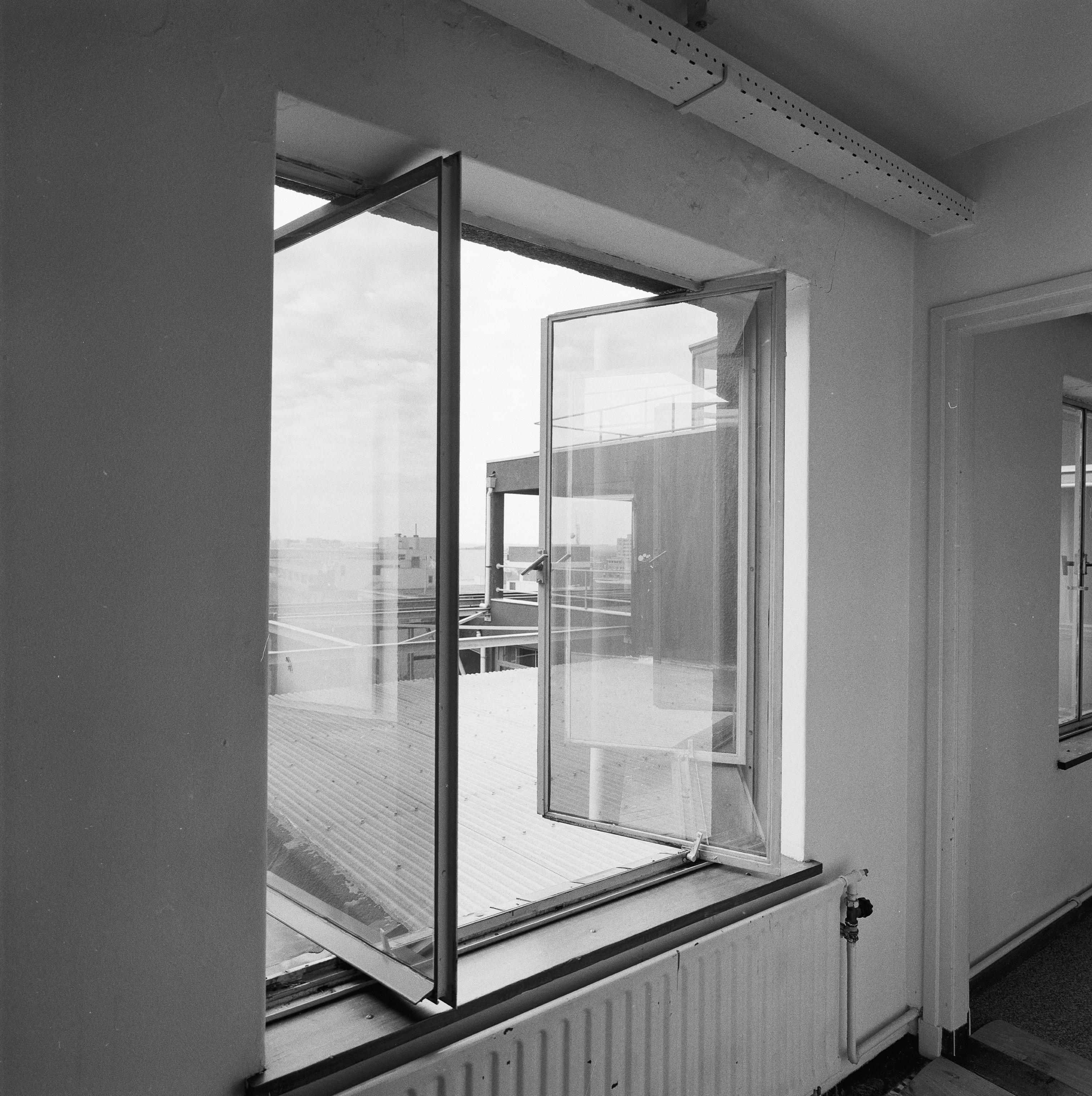 Glaspaleis, Voormalig Warenhuis Schunck: Interieur, penthouse, metalen raamkozijn, draairaam